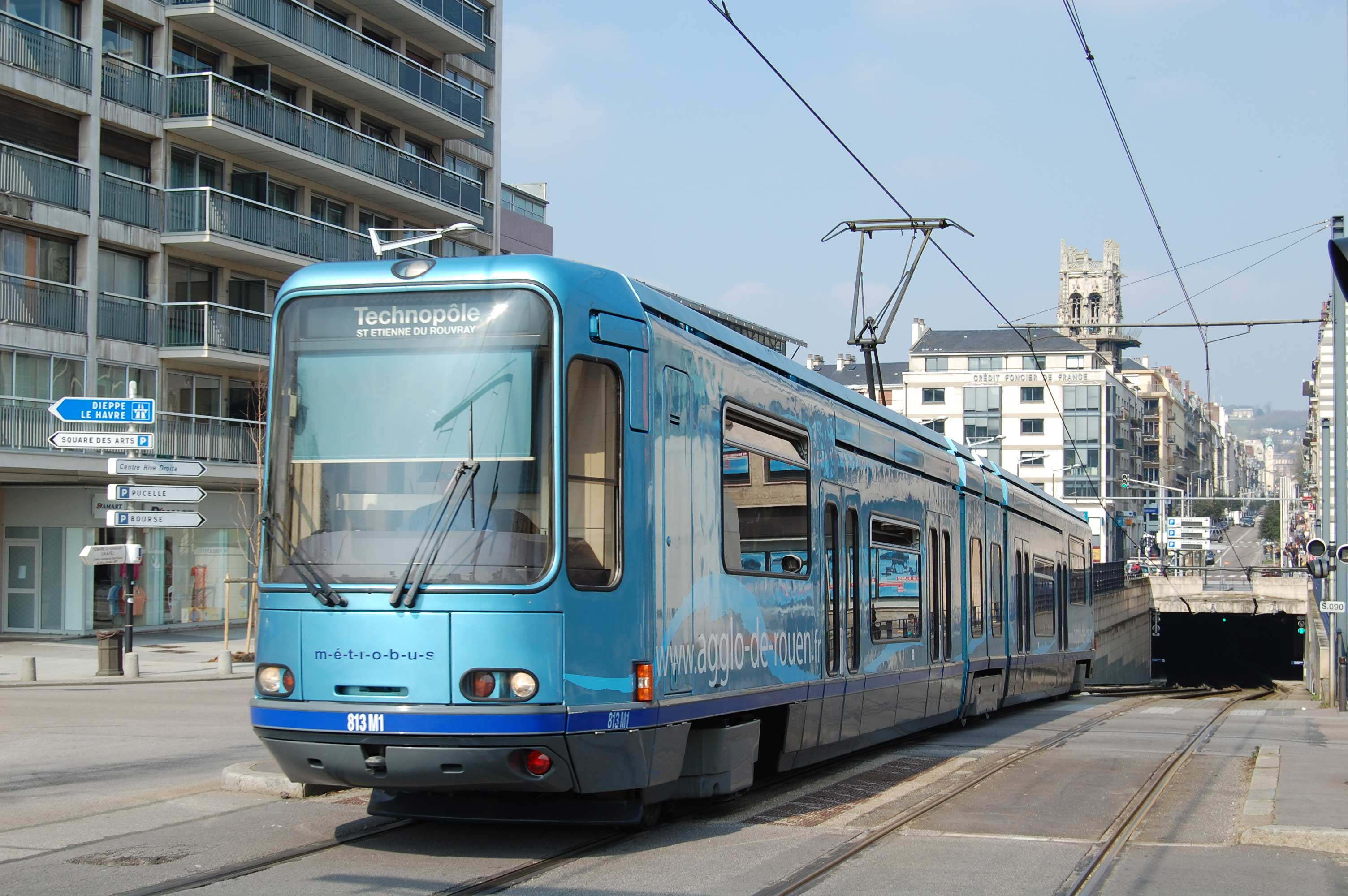 Métro/tramway de Rouen au sud de la station théatre des arts avant la traversée du pont